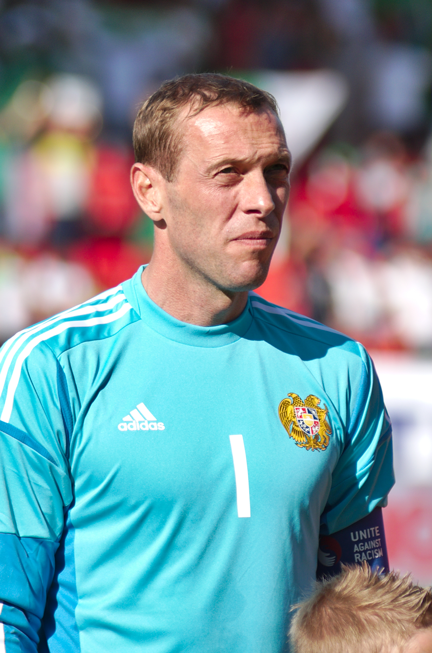 Algérie - Arménie - 20140531 - Roman Berezovski